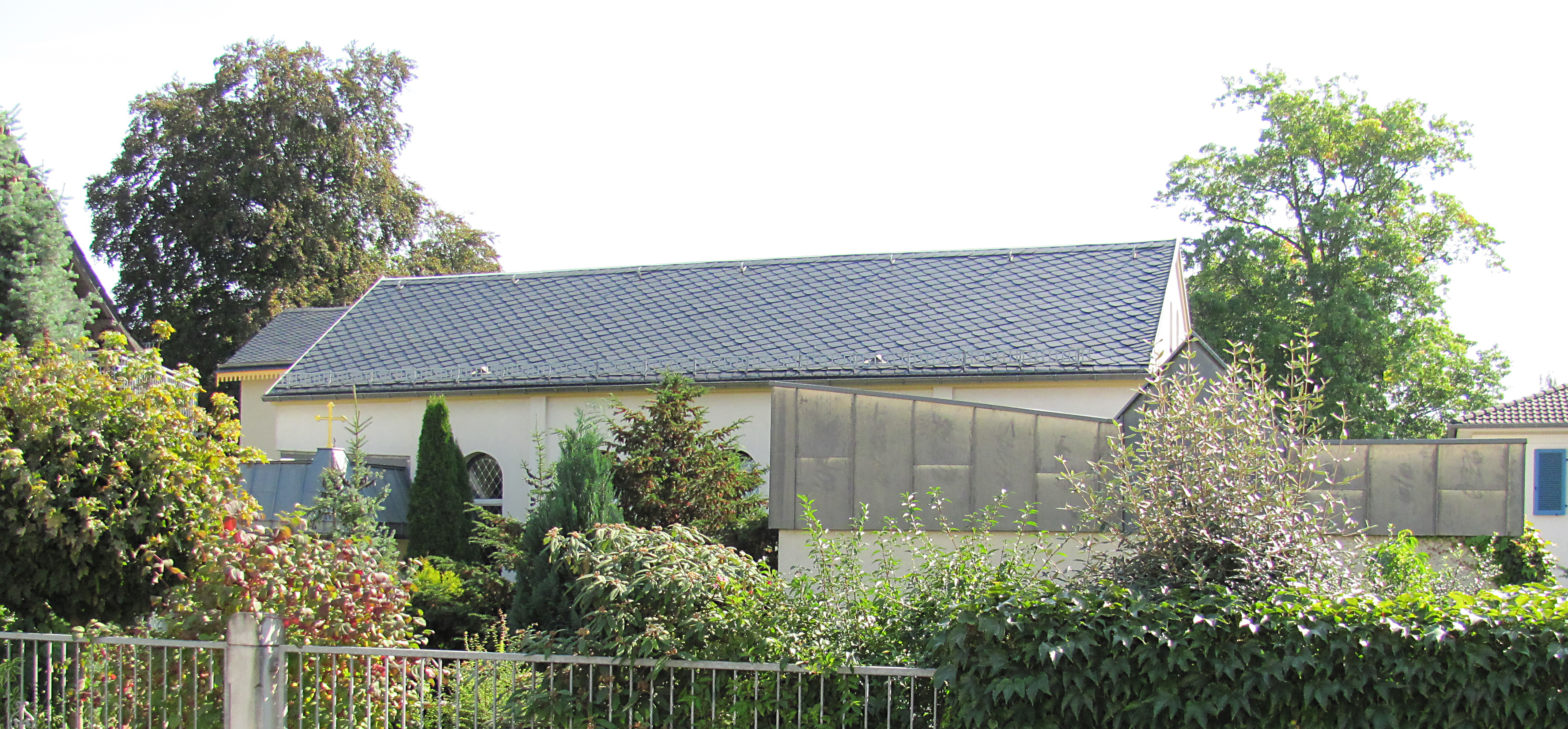 Radebeul, Betsaal neben Villa Ernst Hermann Vogel